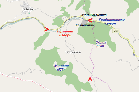 Островичка котлина положај и границе.